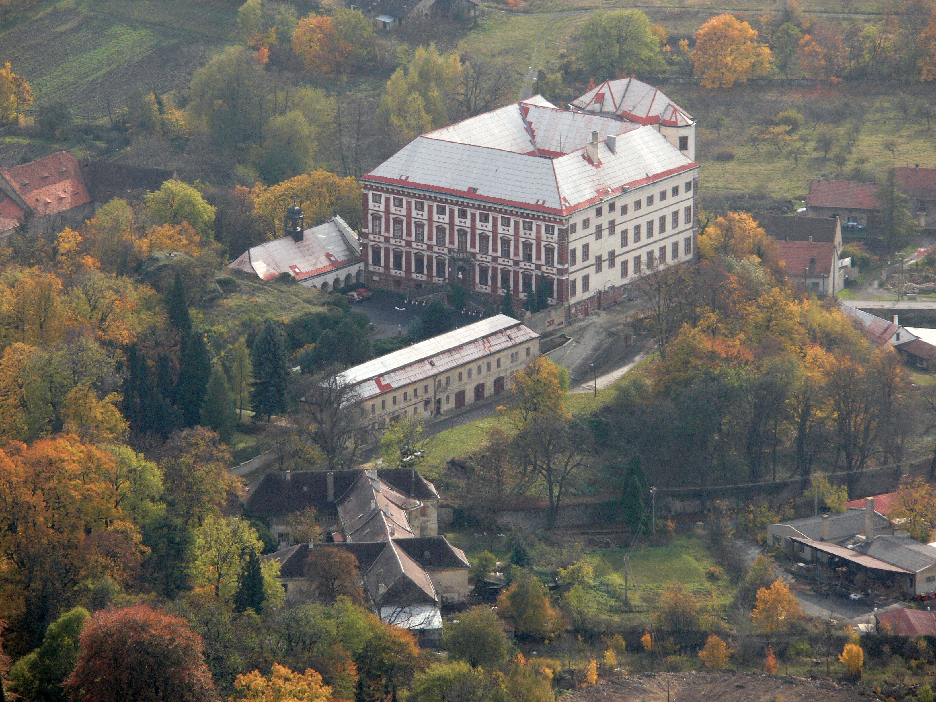 Pohled na zámek Milešov od severu z vrcholu Milešovky